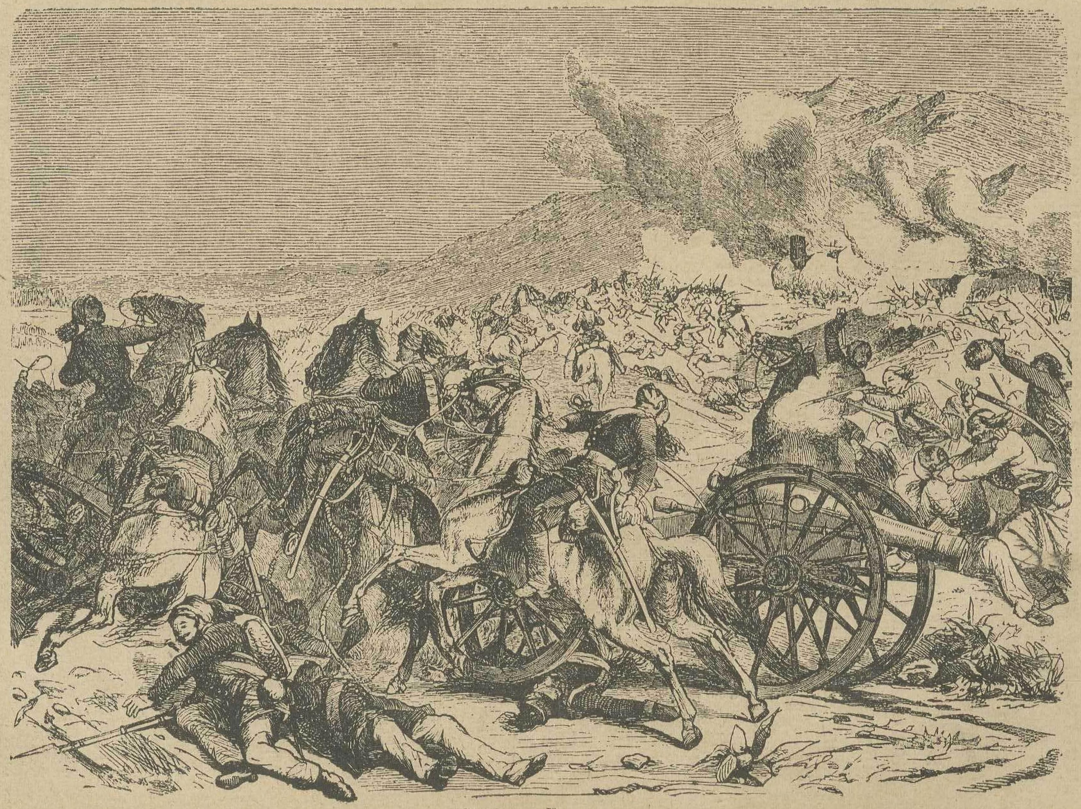 Битва под Грахово 1 мая 1858 года